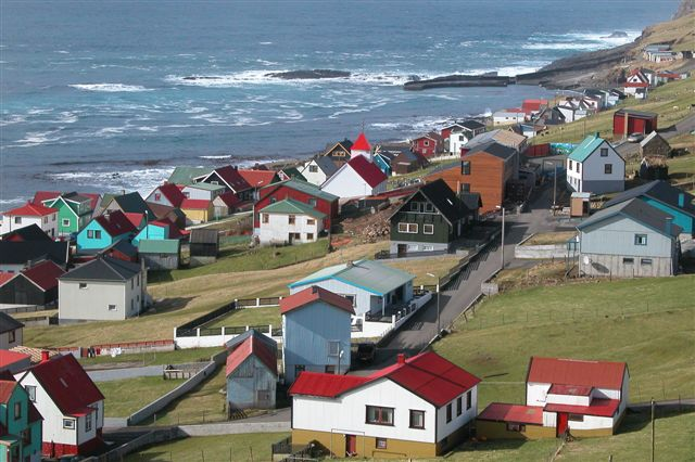 Sumba